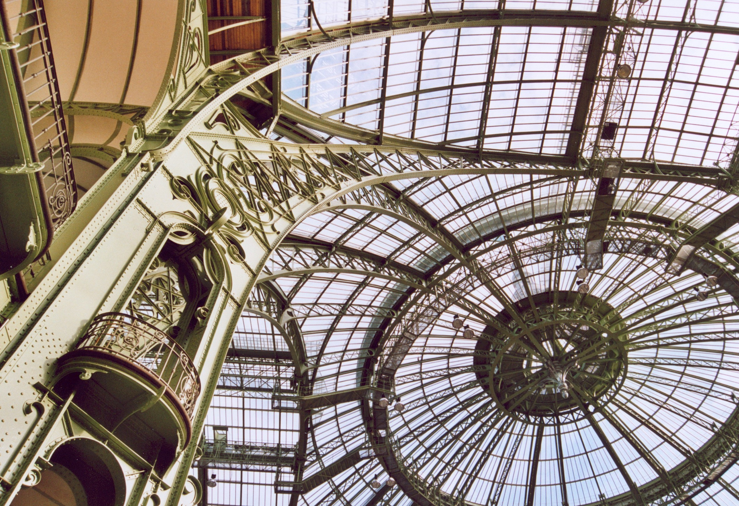 France Paris Grand Palais intérieur Photographie prise par GIRAUD Patrick